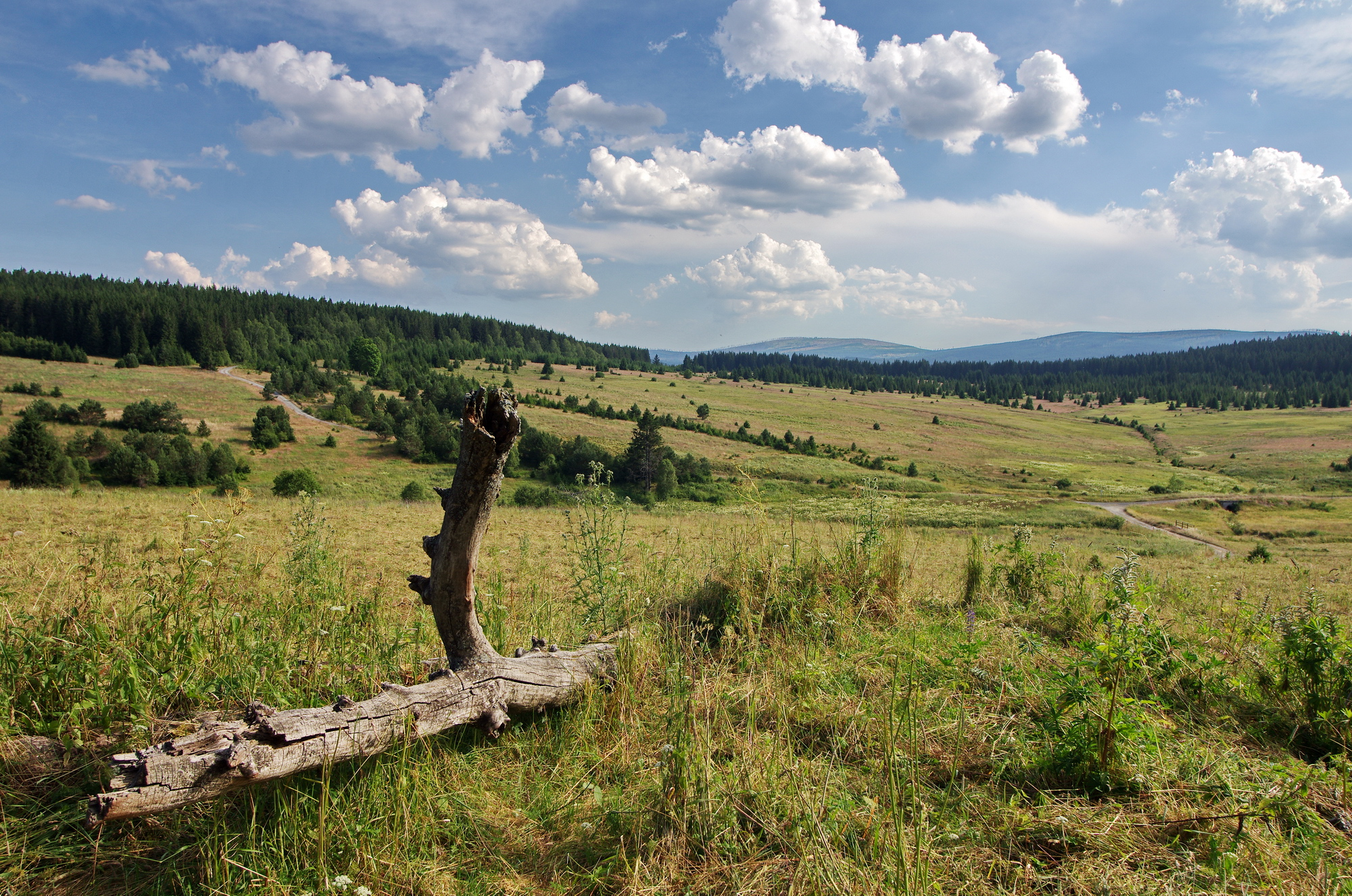 Přírodní rezervace Zhůřská hnízdiště, okres Klatovy